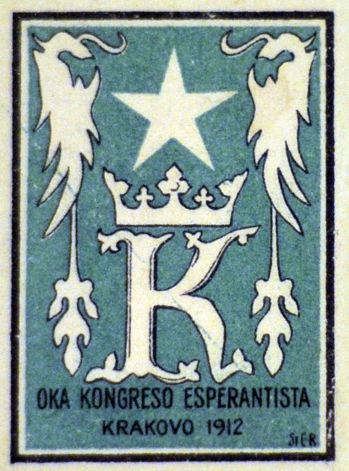 Znaczek Światowego Kongresu Esperantystów w Krakowie, 1912 r.